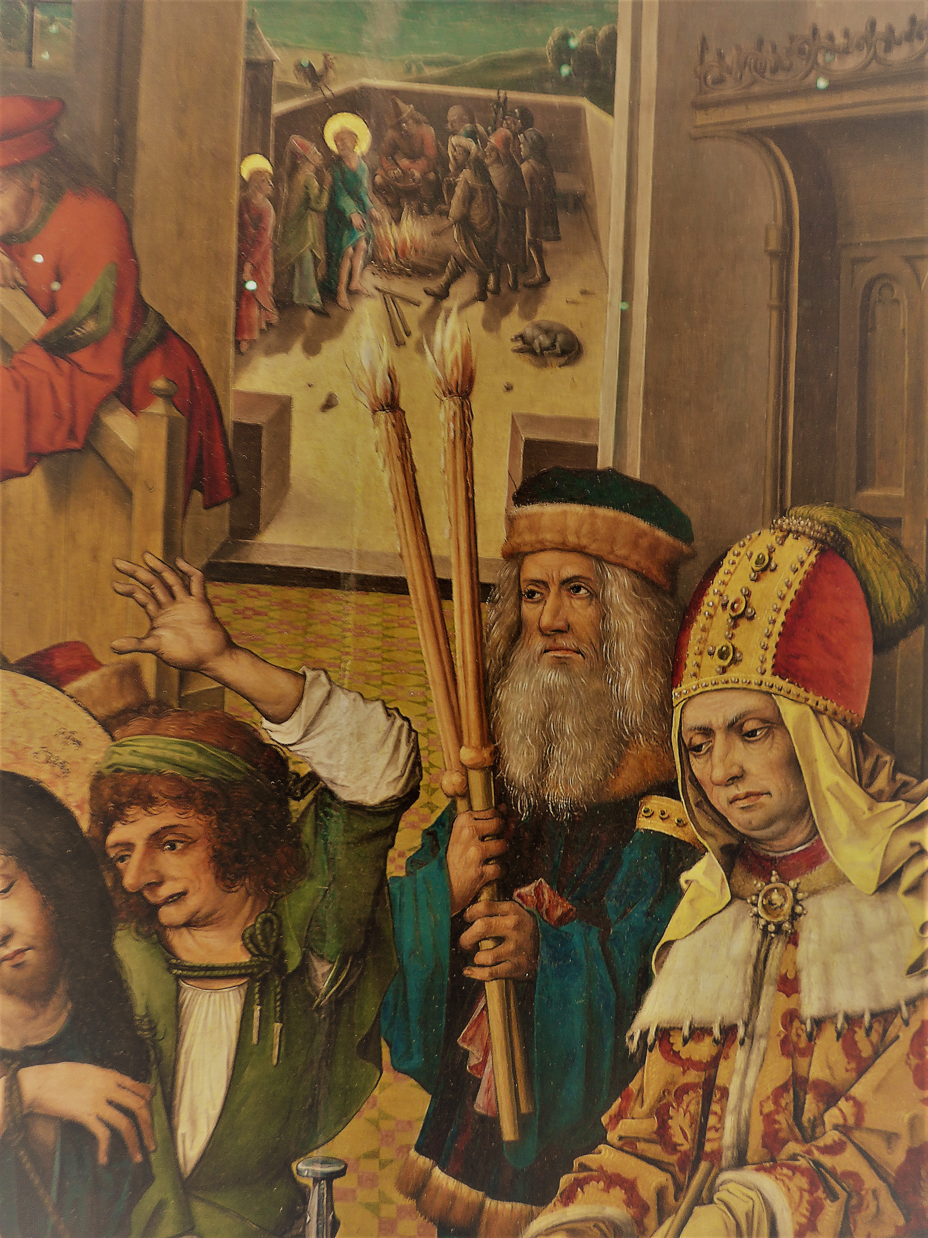 Tortsche (mittelalterliche Wachsfackel) auf einem Detail des Passionsaltars vom Meister des Hausbuchs, um 1480. Freiburg, Augustinermuseum.